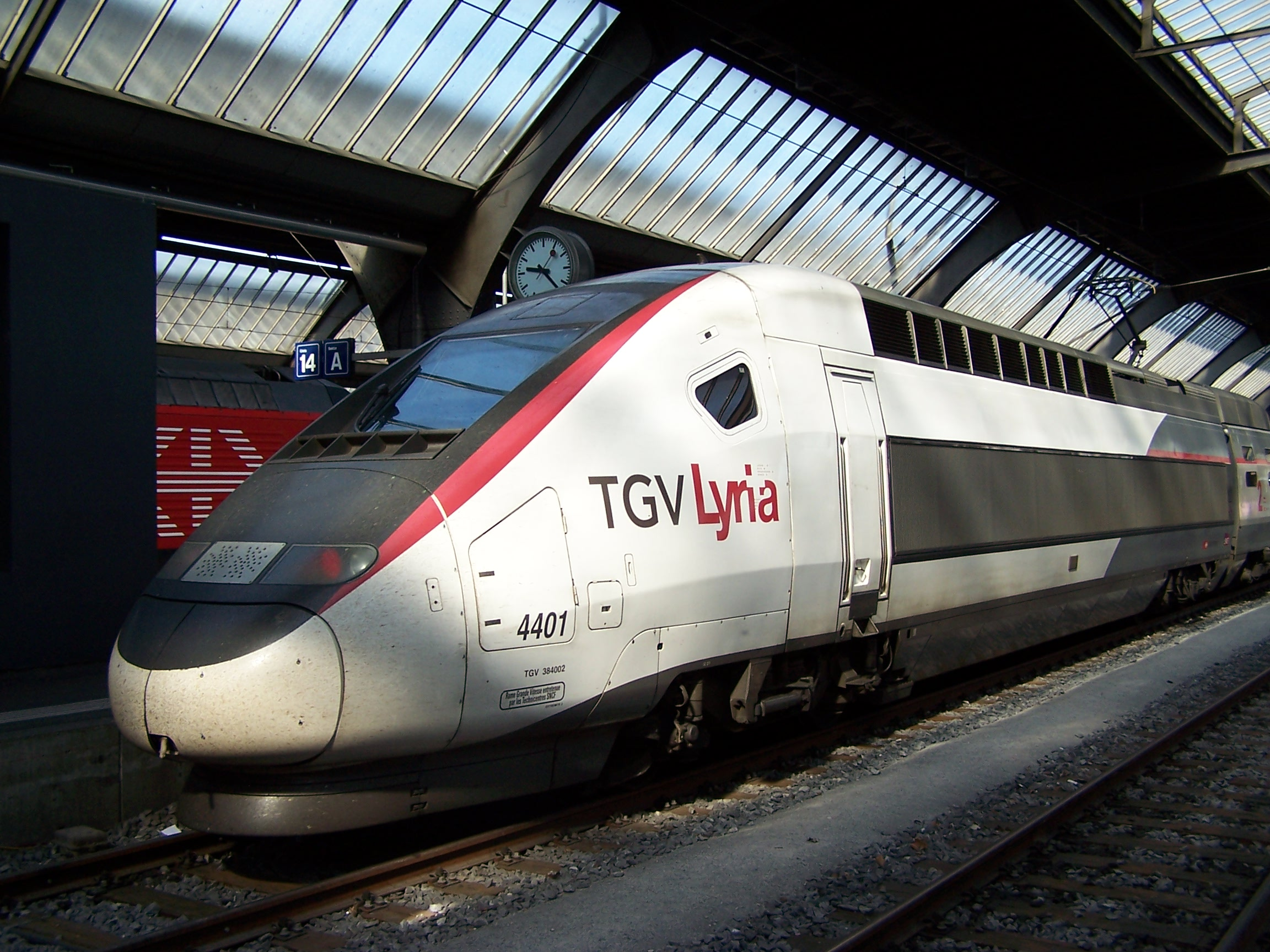 TGV Lyria 4401 in Zürich HB